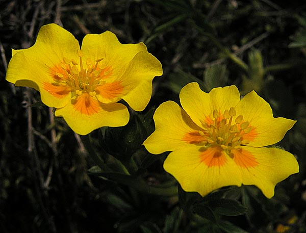 Gold-Fingerkraut (potentilla aurea), aufgenommen auf einer Bergwiese in der Nähe von Bolsterlang (Allgäuer Alpen)